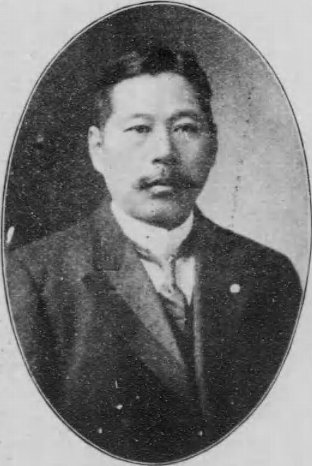 国分三亥（1862-1964）